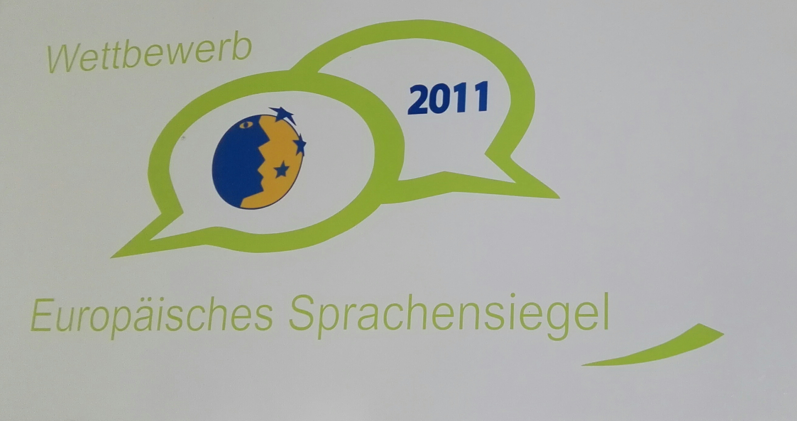 Kaufmännische Schule Tauberbischofsheim - Europäisches Sprachensiegel 2011 An der Schule wurden in Kooperation mit der französischen Schule „Lycée Alexandre Dumas“ in Illkirch (Elsass) und der Landesakademie für Fortbildung und Personalentwicklung an Schulen Baden-Württemberg wesentliche Inhalte des Landesakademie-Bildungsprojektes „Deutsch-französischer virtueller Online-Markt – anwendungsbezogenes Sprachenlernen durch Gründung virtueller Firmen und Abwicklung der Geschäftsprozesse“ entwickelt. Dieses wurde im Rahmen des Wettbewerbs „Sprachenlernen in der Gemeinschaft – Ressourcen nutzen und Kompetenzen ausbauen“ mit dem Europäischen Sprachensiegel 2011 ausgezeichnet.